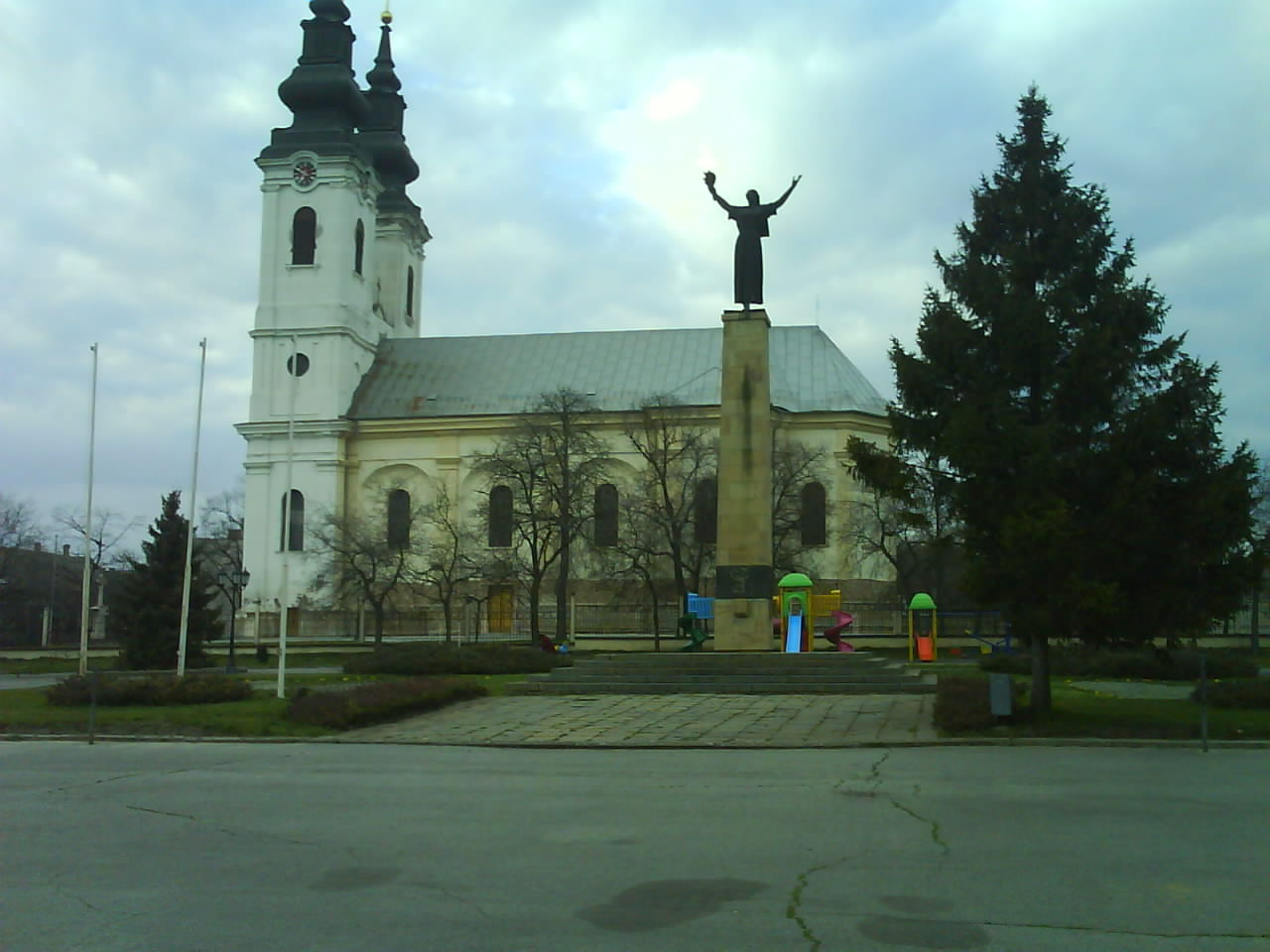 Cenat Srbobrana